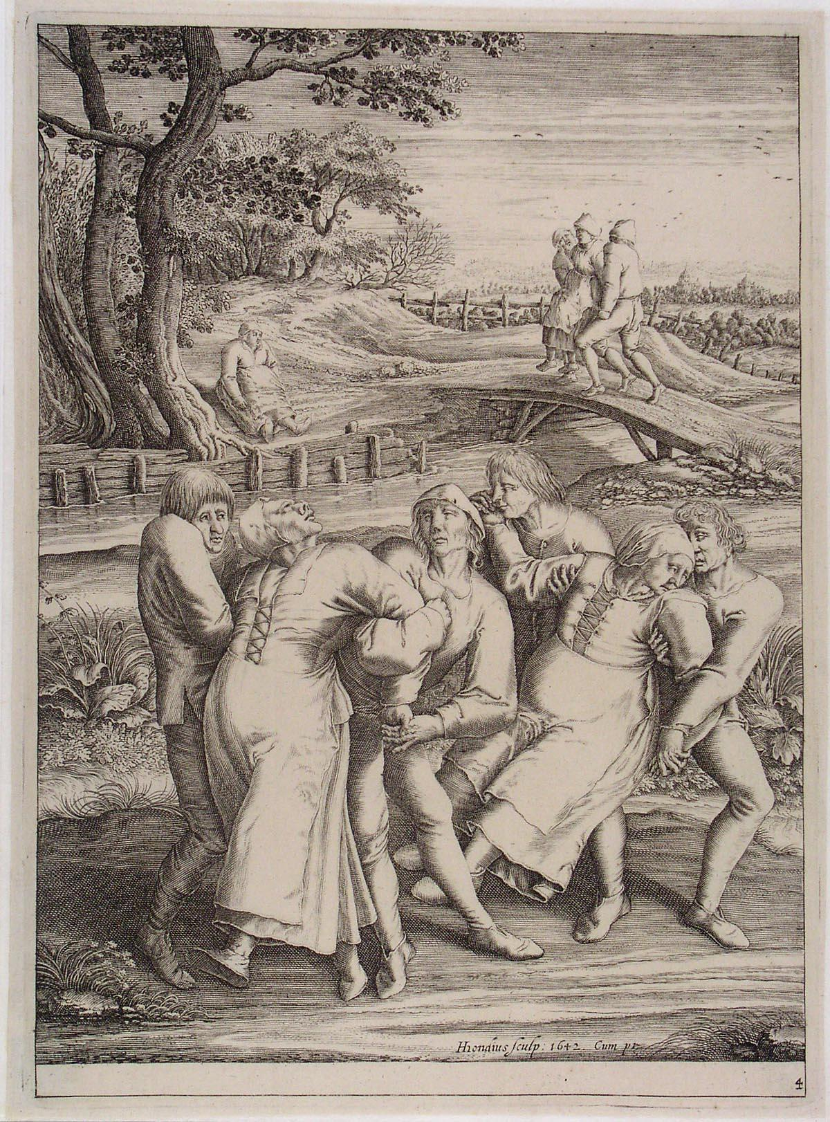 Pelgrimstocht van epileptici naar de kerk te Molenbeek. Prent gegraveerd door Hendrick Hondius I naar een verloren schilderij van Pieter Bruegel de Oude. Uitgegeven door Frederick de Wit in 1642. Prentenkabinet Museum Boijmans Van Beuningen (bruikleen door Stichting Lucas van Leyden)